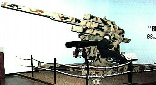 German 88mm gun